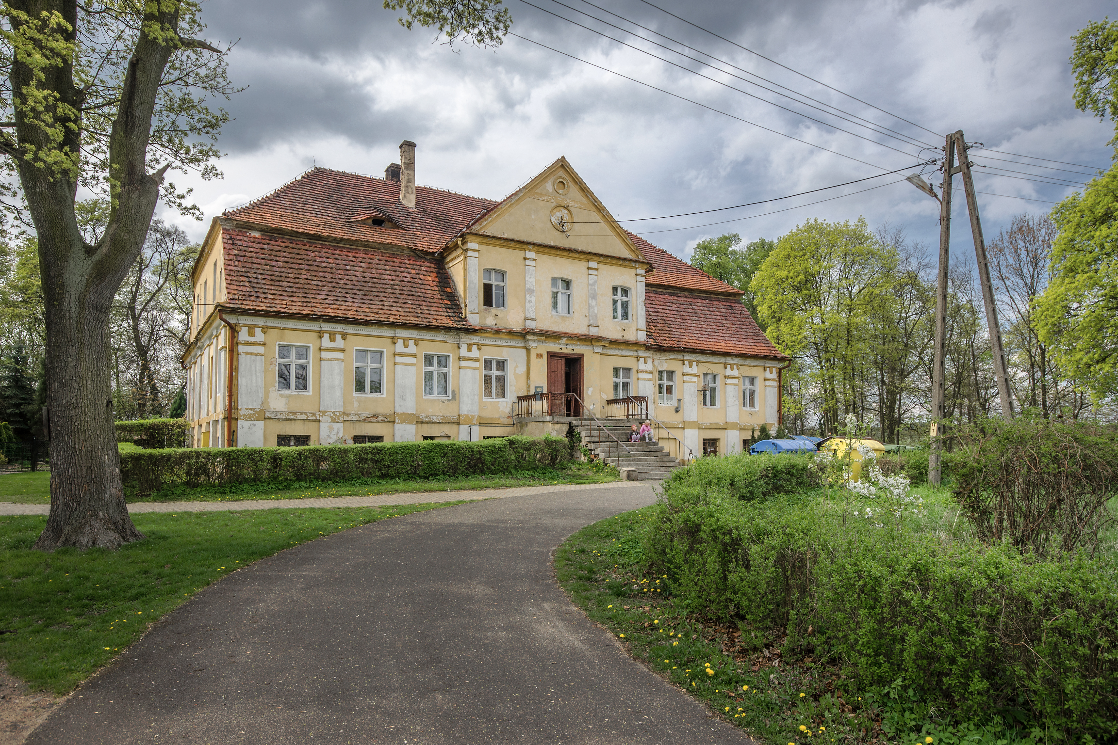 Nieszczyce, dwór, 1840, 1923